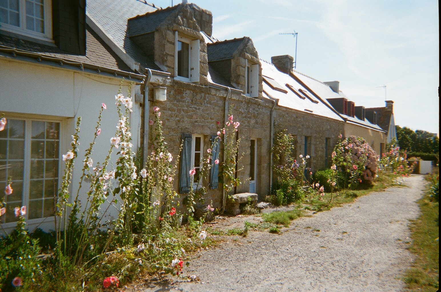 Rue typique de l'île, bordée de roses trémières et d'hortensias